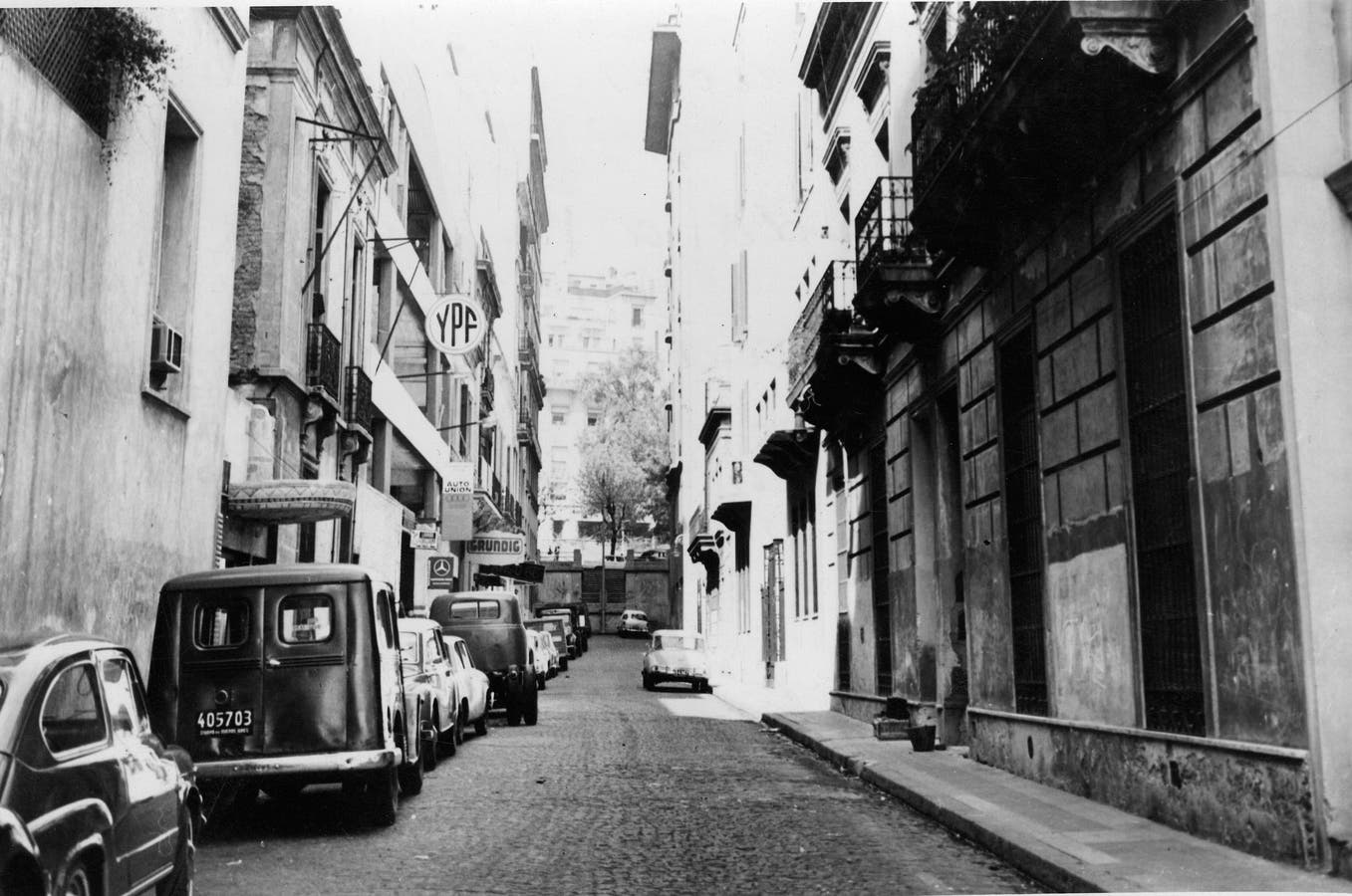 Vista del Pasaje Seaver en la década de 1960.